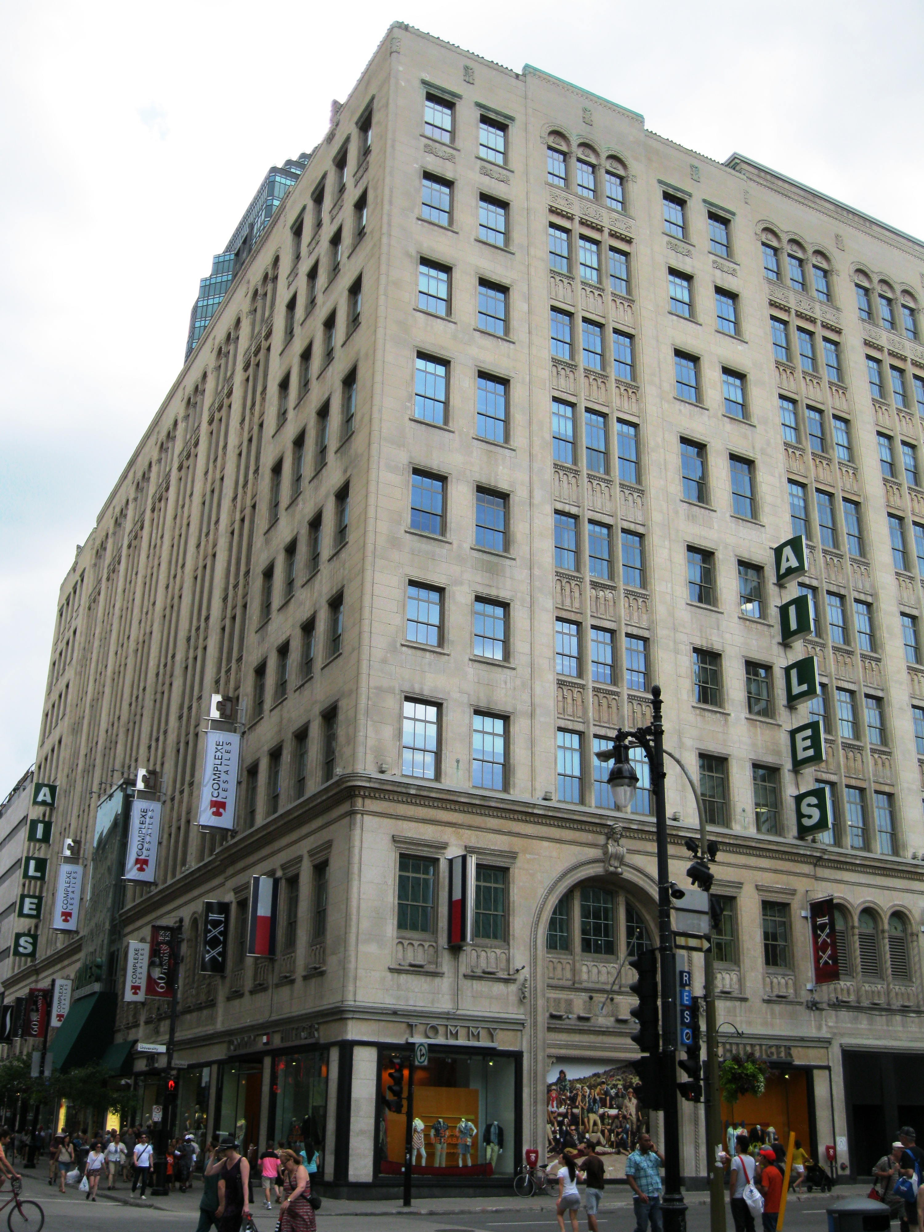 Les Ailes de la mode, édifice Eaton, Montréal